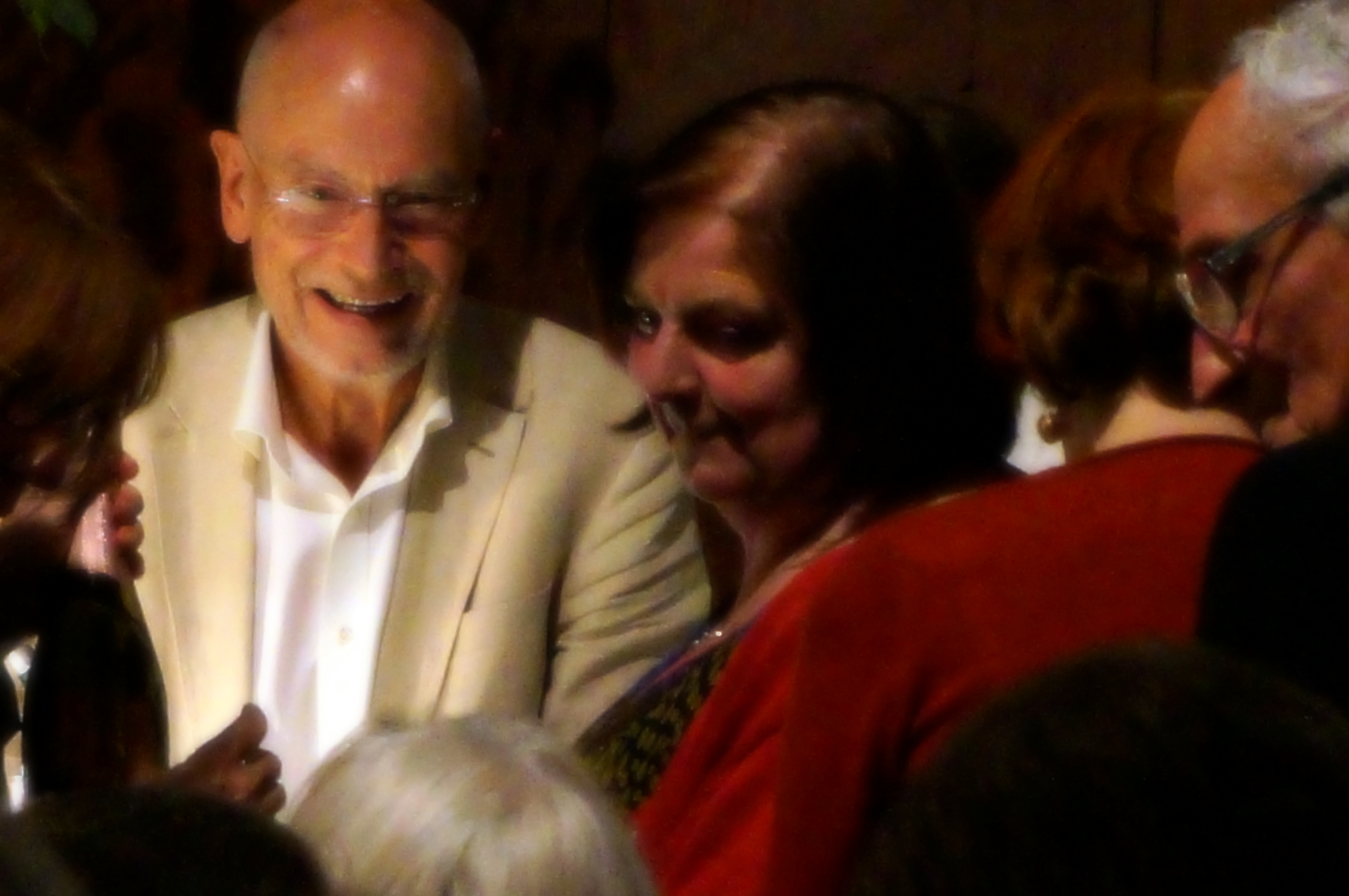 Gert Heidenreich und Gäste (u.a. Maria Peschek) anlässlich einer Veranstaltung des Seerosenkreises in der Münchner Seidlvilla mit dem Titel "70 Jahre Gert Heidenreich - eine vielstimmige Hommage" am 2. April 2014